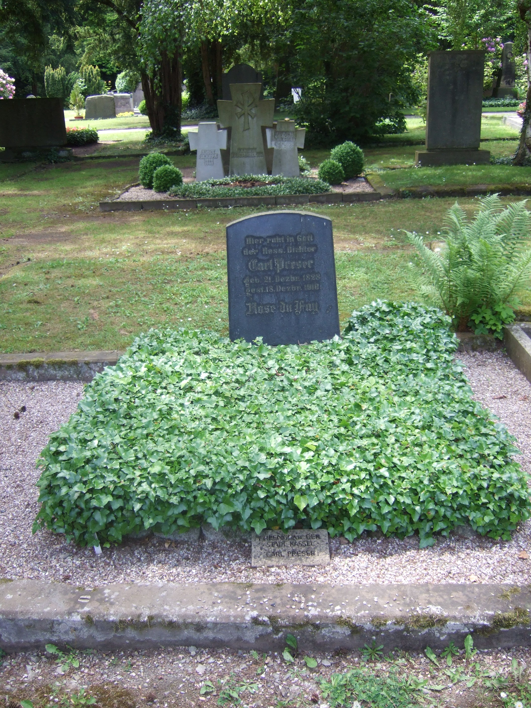 Grab von Karl Preser auf dem Hauptfriedhof Kassel.